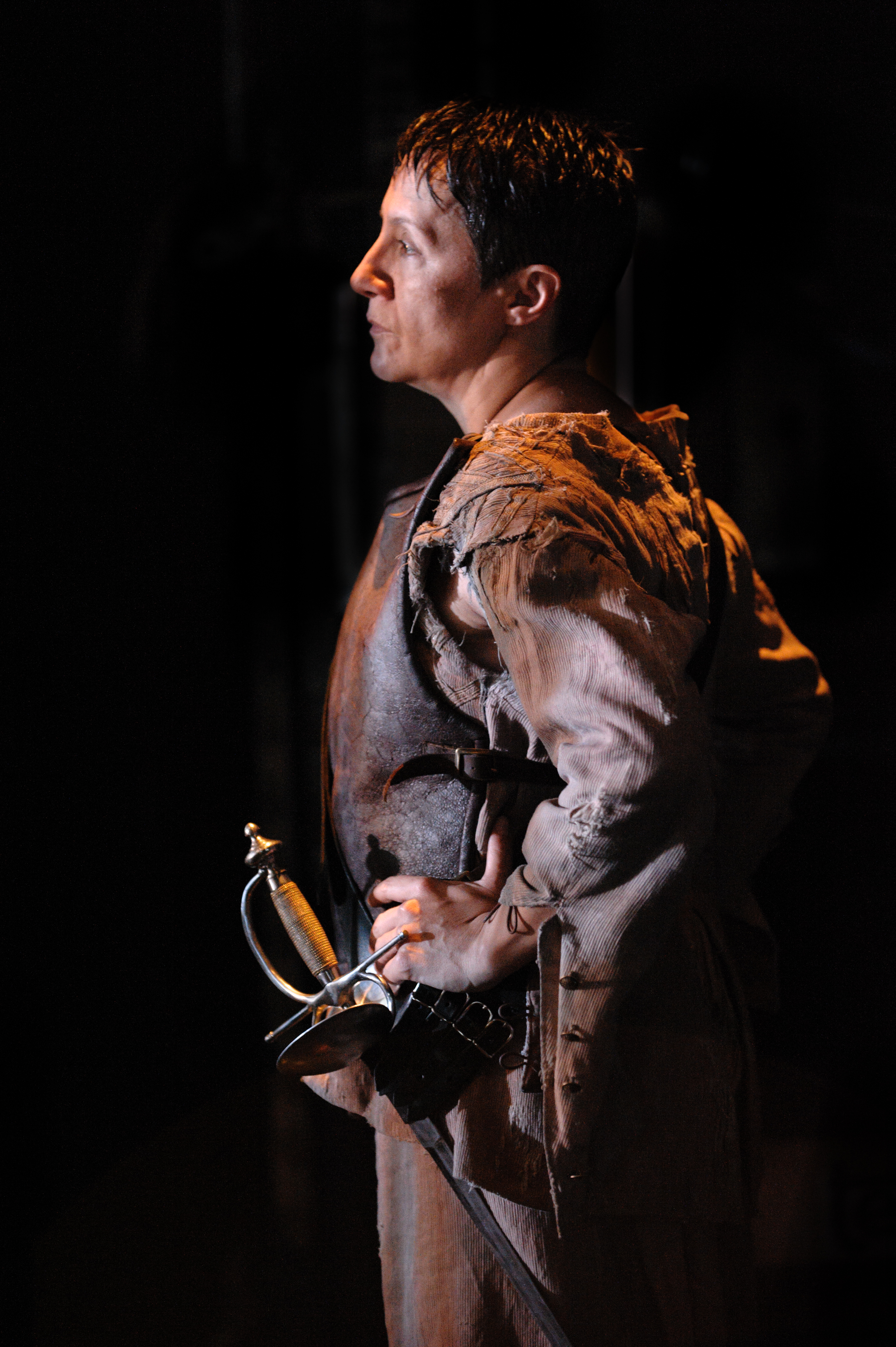 Blanca Portillo como Segismundo en 'La vida es sueño'. 35 edición del Festival de Teatro Clásico de Almagro. Datos de la obra Título: La vida es sueño Autor: Calderón de la Barca Versión: Juan Mayorga Dirección: Helena Pimenta Cía: Compañía Nacional de Teatro Clásico Foto: Guillermo Casas